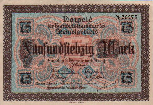 Memelland 75 mark 1922